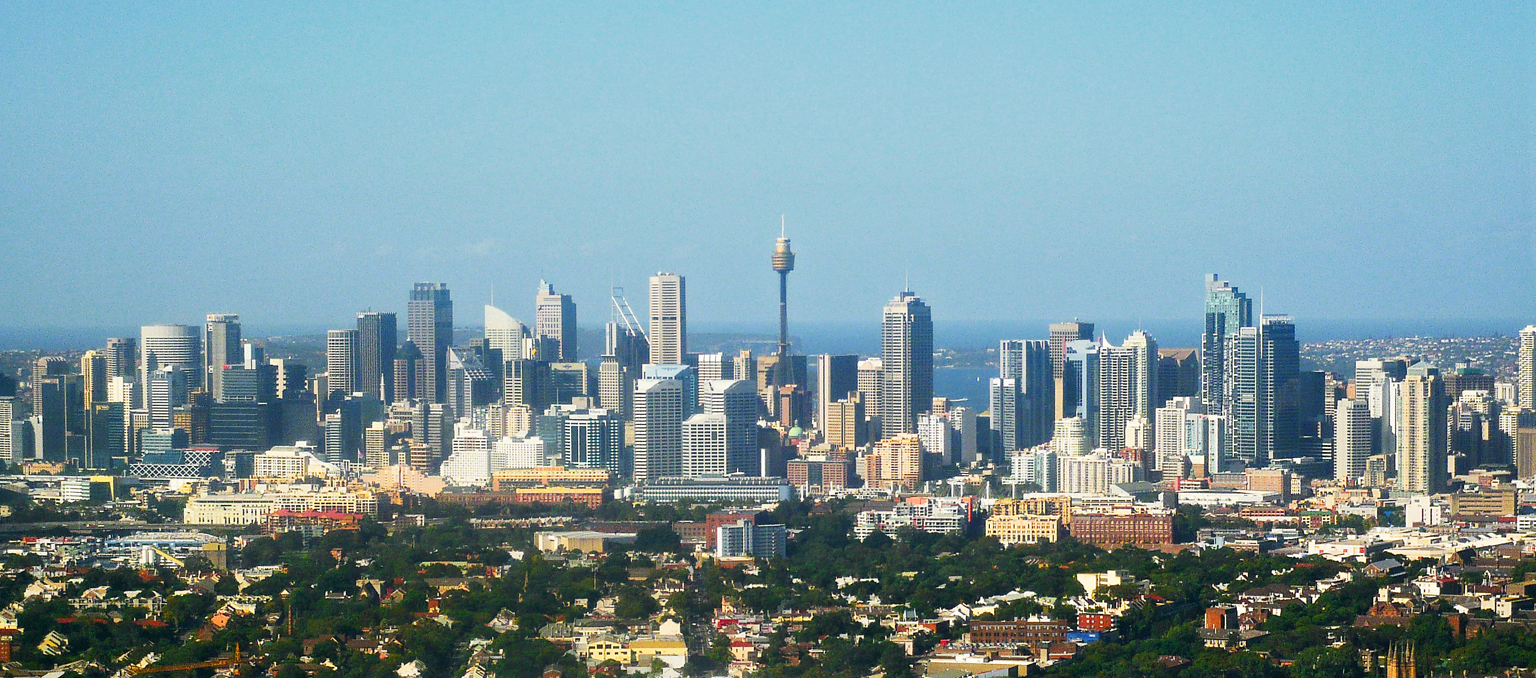 Sydney skyline